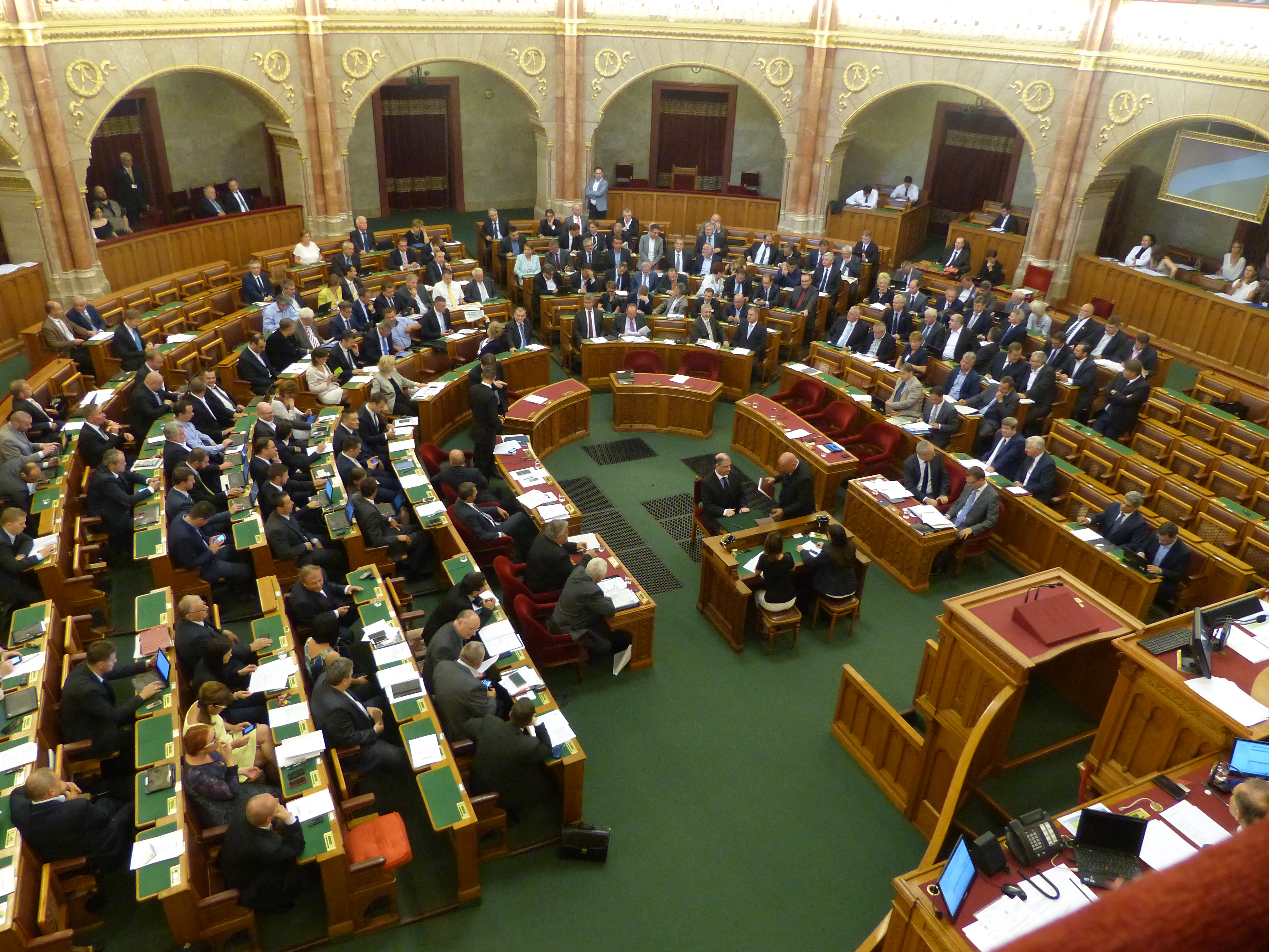 Dr. Kardkovács Kolos, a Magyar Nemzeti Bank Monetáris Tanácsa tagjának eskütétele. A felvétel 2016. szeptember 12-én készült az Országgyűlésben, Budapesten.